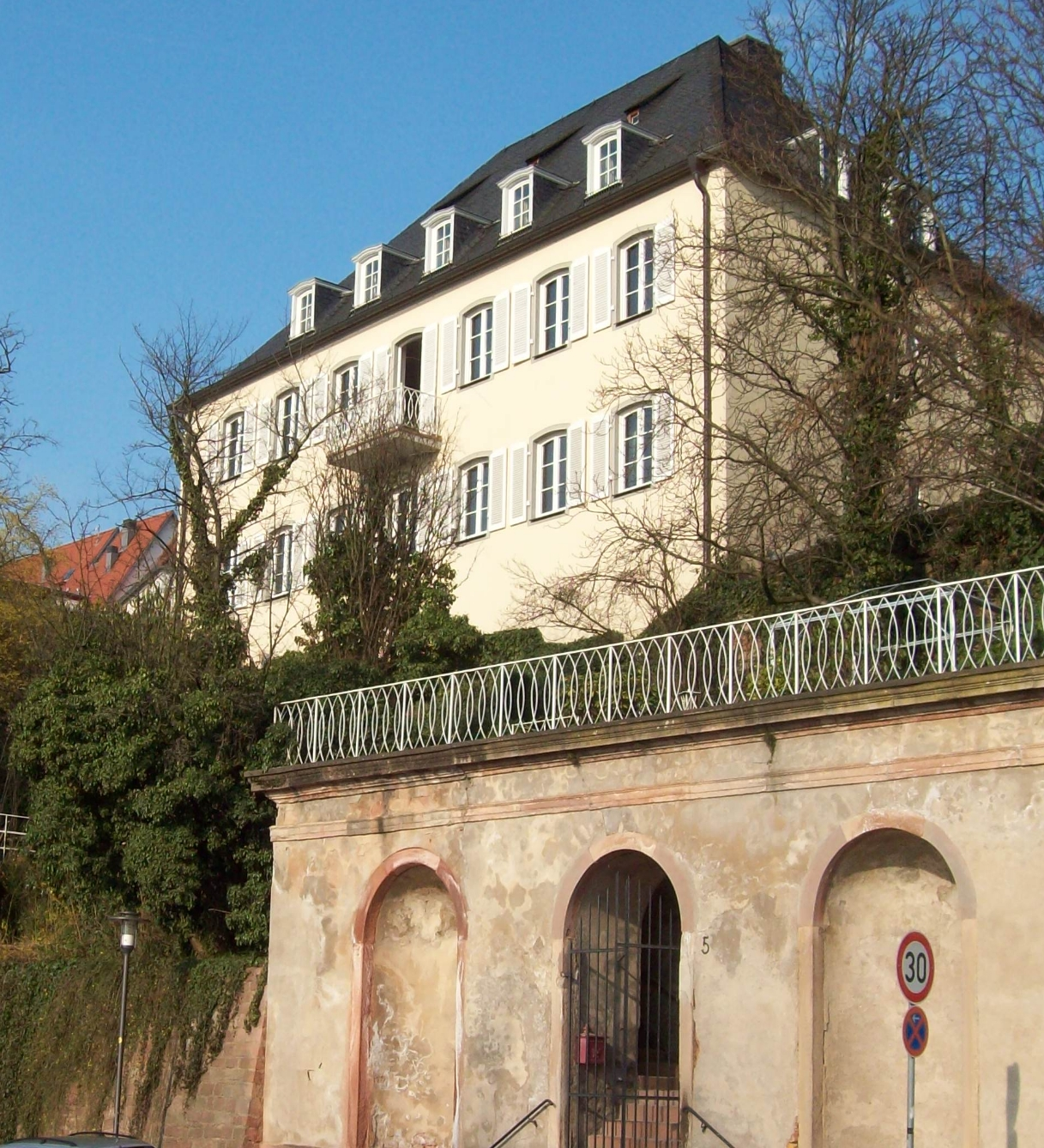 Wohnhaus Christian Brentanos 1784-1851 und dessen Ehefrau Emilie Genger 1810-1882, hier starb am 28. September 1842 der Dichter Clemens Brentano 1778-1842 Das Haus wurde 1945 völlig zerstört und wurde wieder aufgebaut.